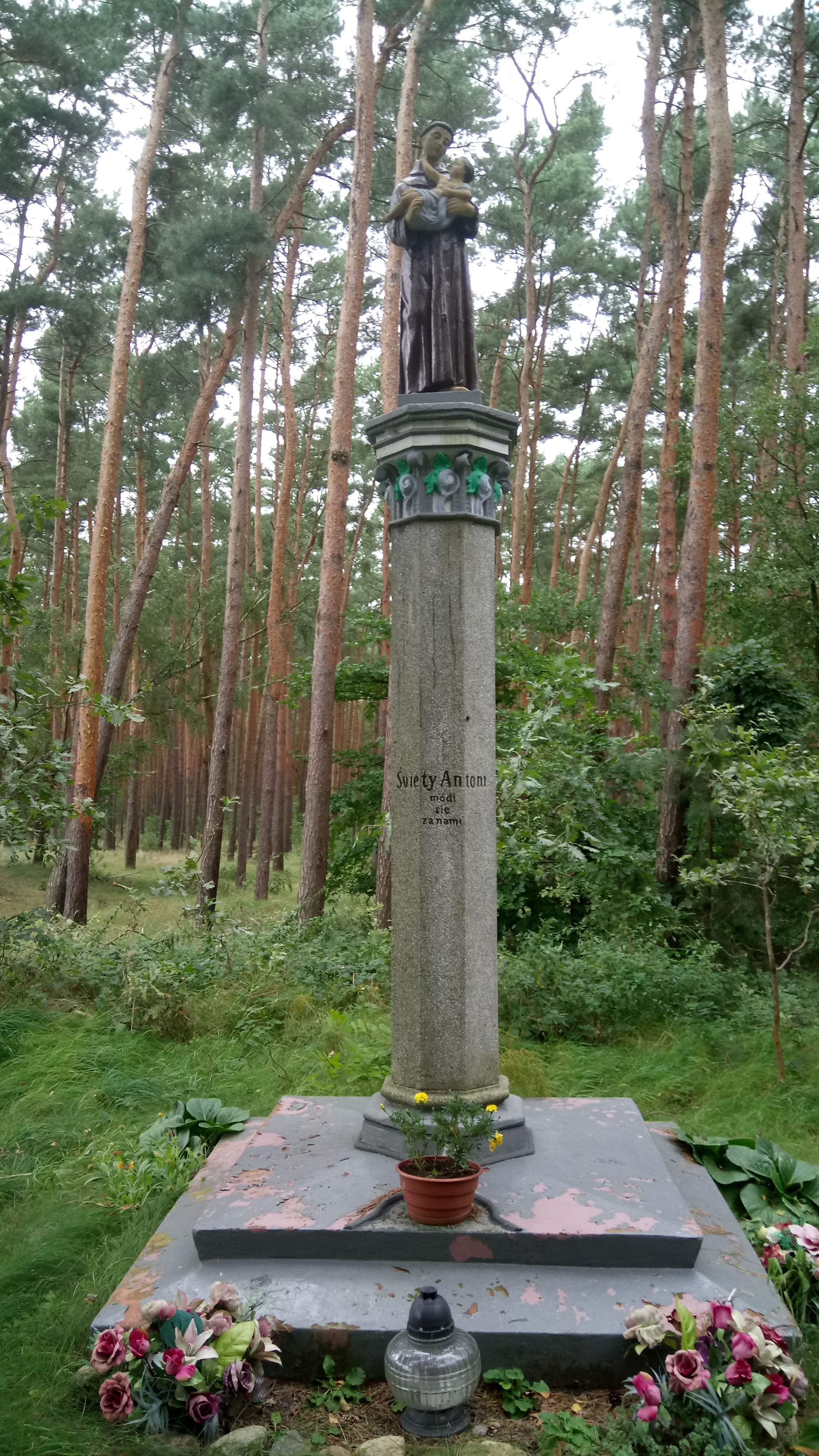 Figura św. Antoniego w Ławicy